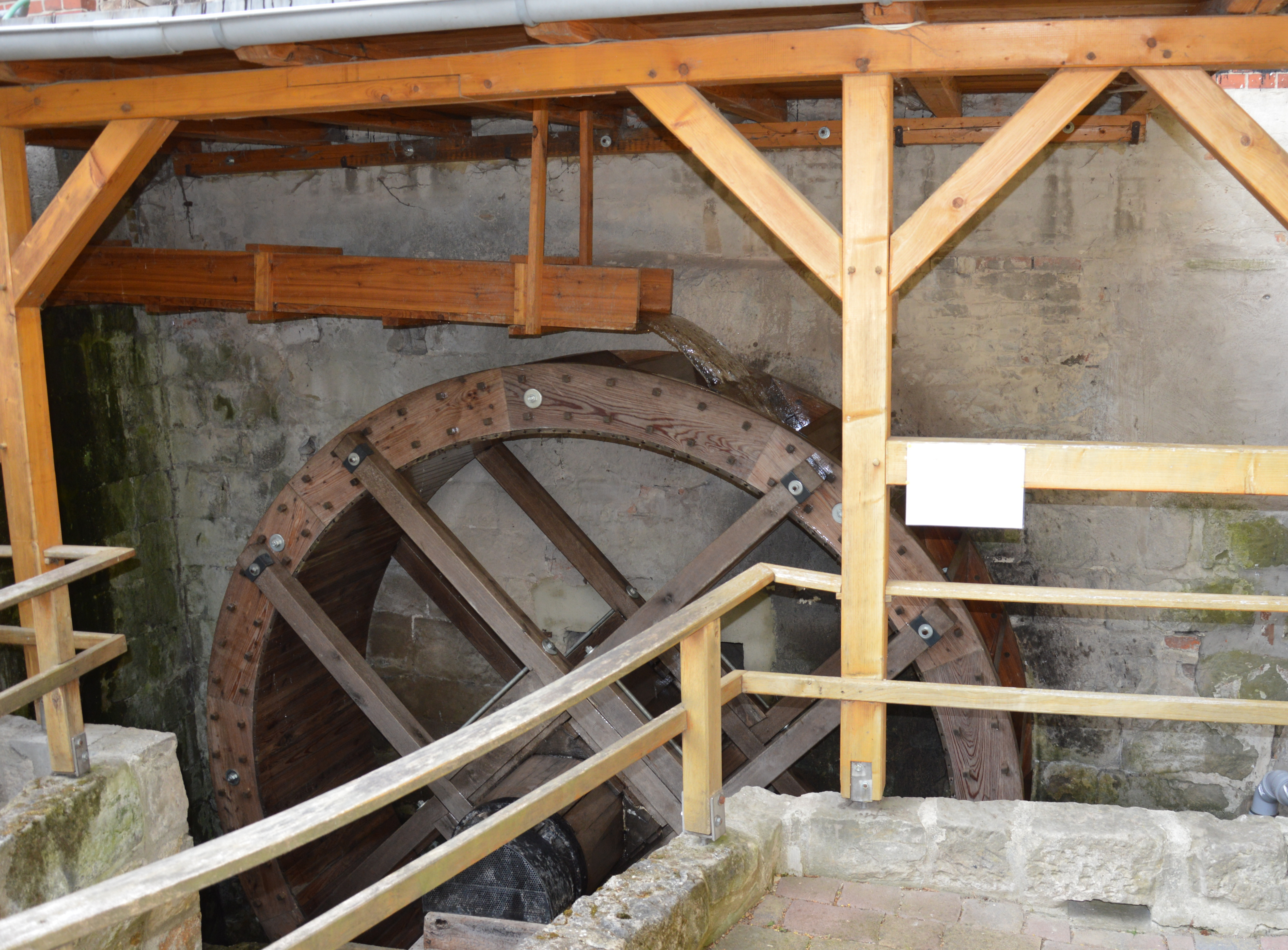 Mühlrad der Wassermühle Klein Quenstedt